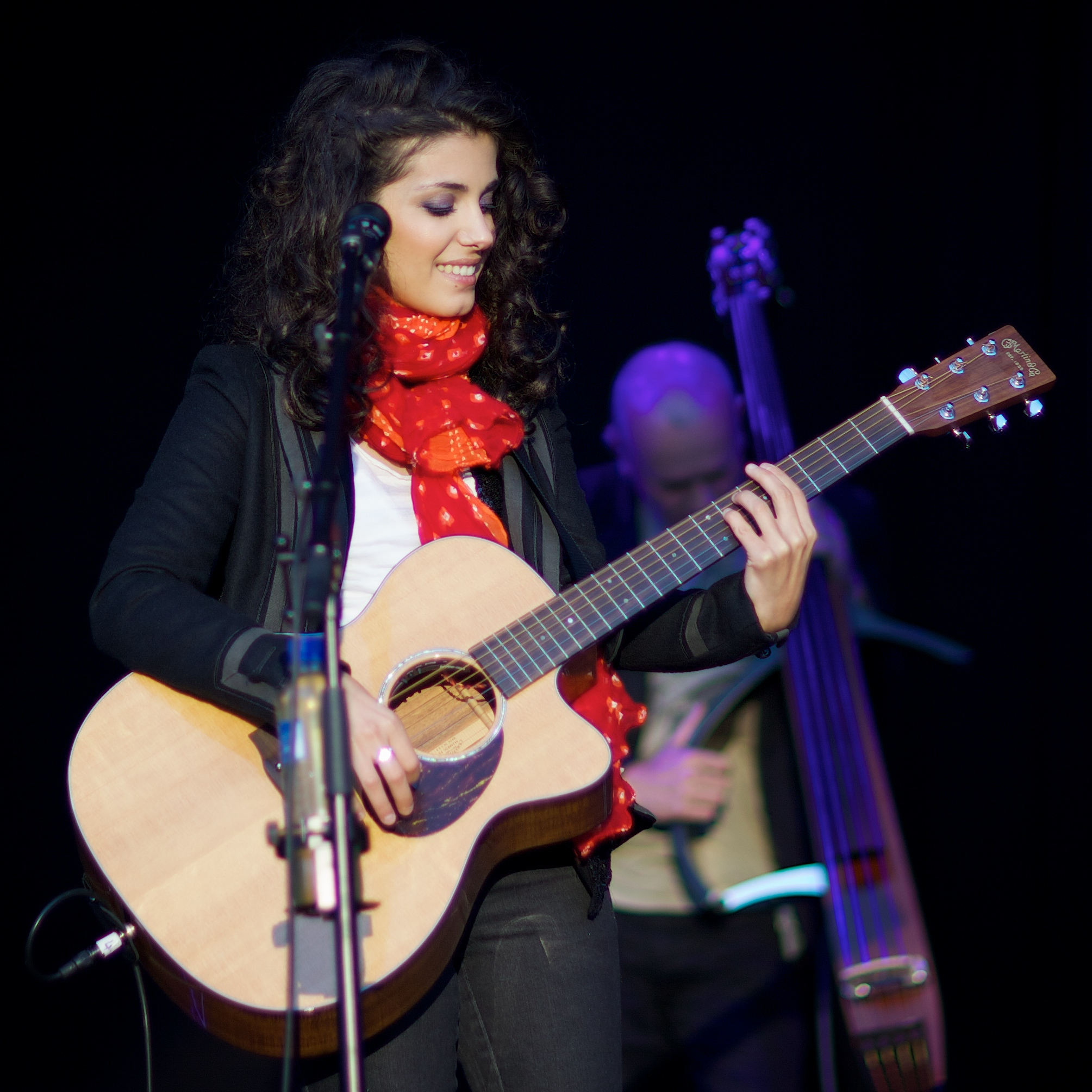 Katie Melua at Wrightegaarden, Norway.